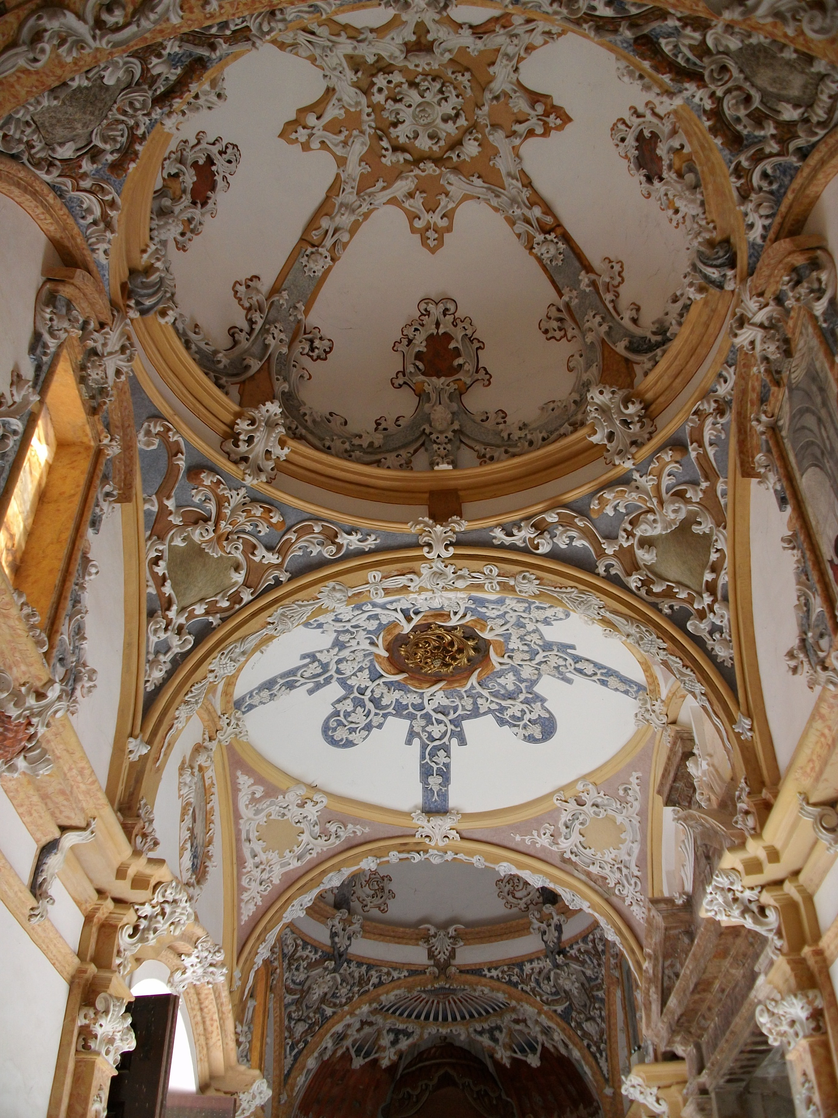 Atri barroc, anterior a l'església del Monestir de la Valldigna, País Valencià.